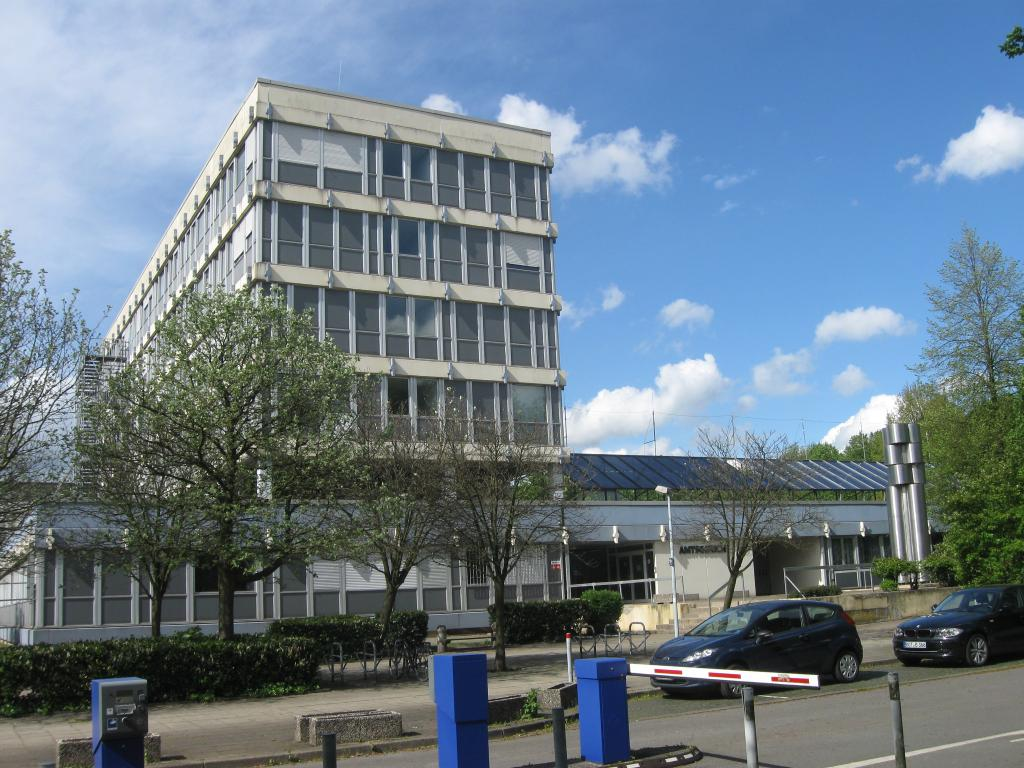 Dienstgebäude des ehemaligen Amtsgerichts Gelsenkirchen-Buer im Buerer Stadtpark (Goldbergstraße 89, eröffnet 1973). Der Gerichtssitz wurde nach der Auflösung des Gerichts und dem Umzug der Gelsenkirchener Justiz in das neue Justizzentrum Gelsenkirchen am Wissenschaftspark im Januar 2016 aufgegeben.